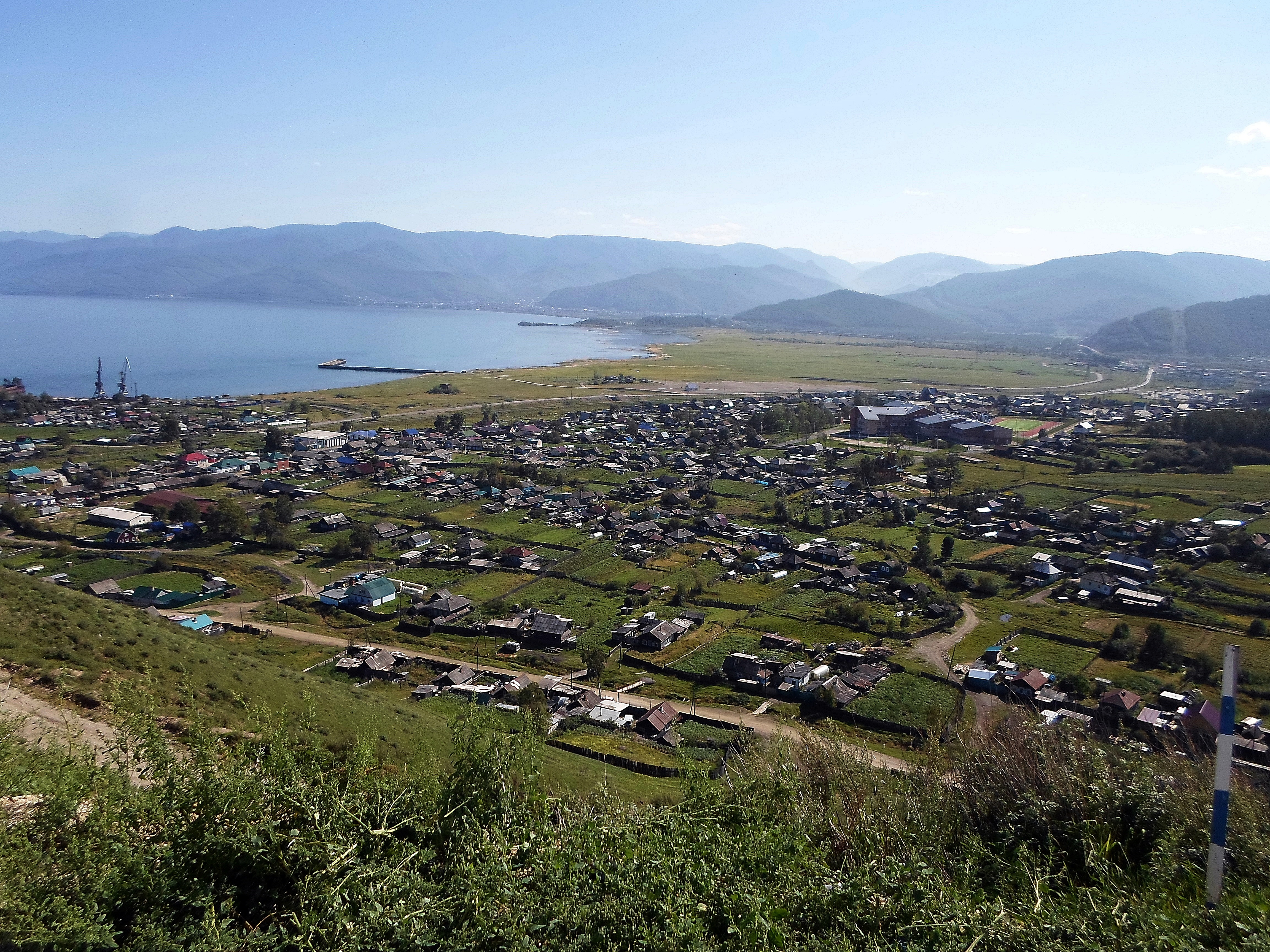 Култук. Вид на центральную часть посёлка с "Серпантина".